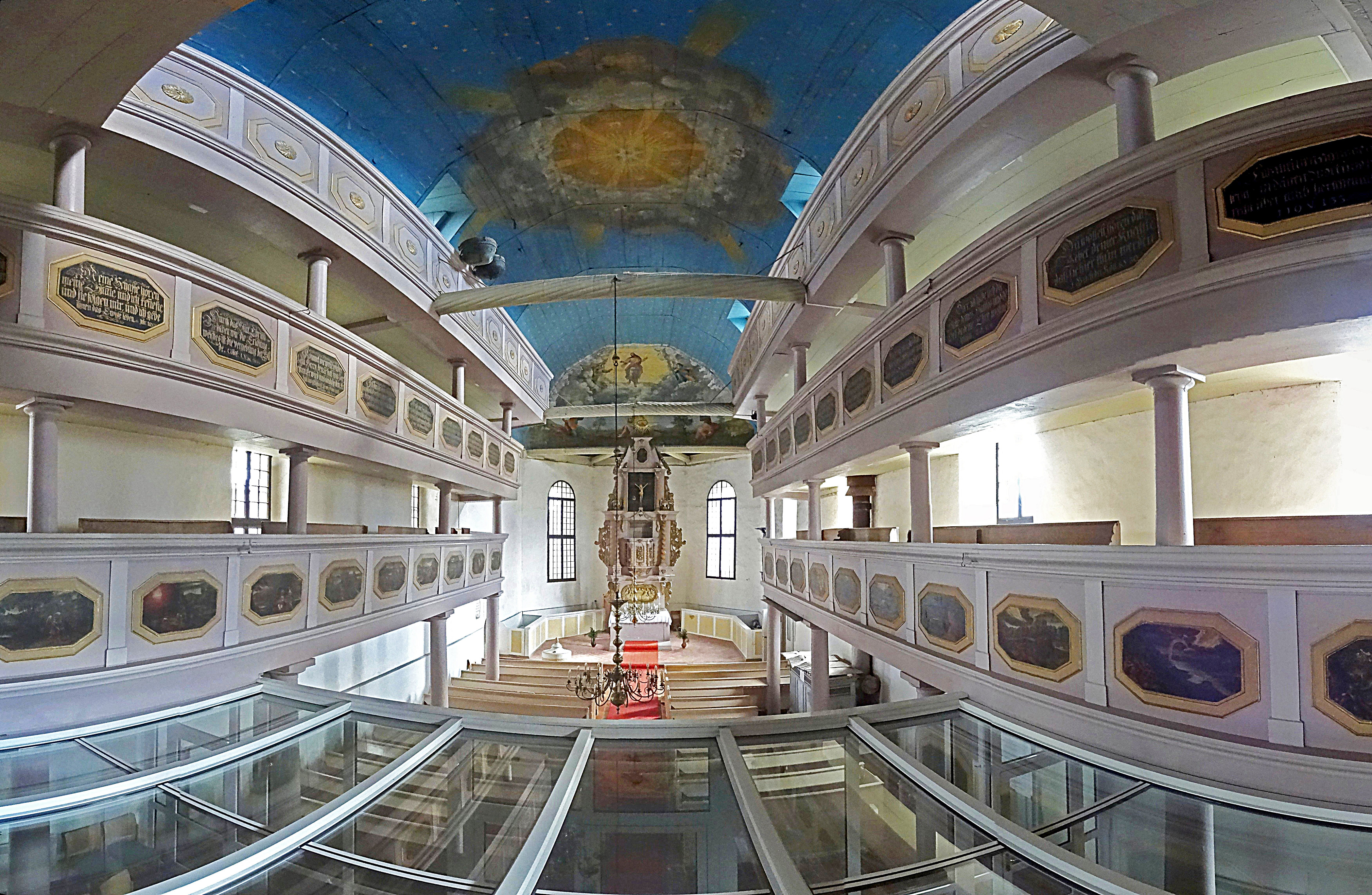 St. Peter und Paul Großmonra, eine der seltenen Kirchen mit 3 Emporen